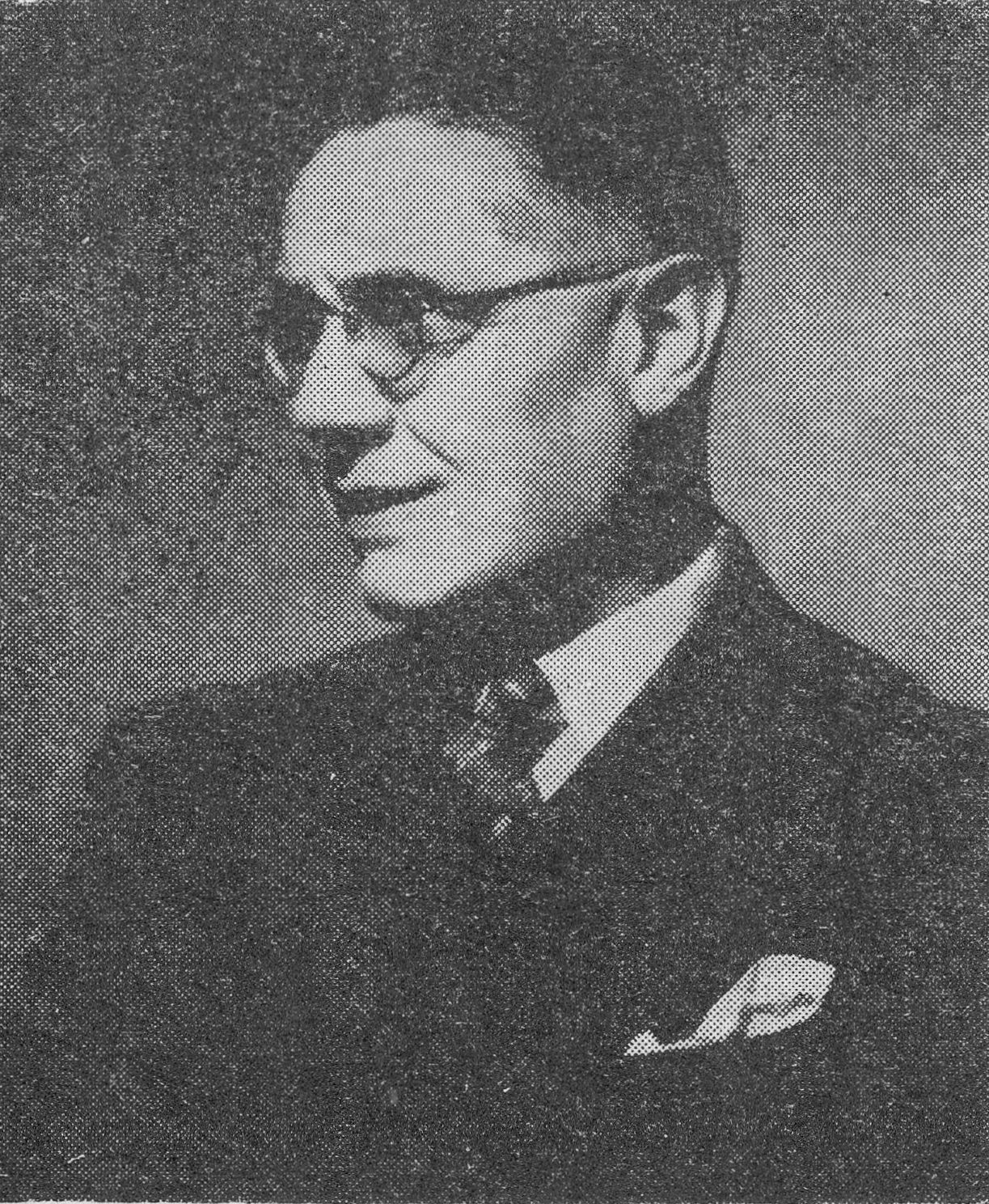 Arnold Szyfman